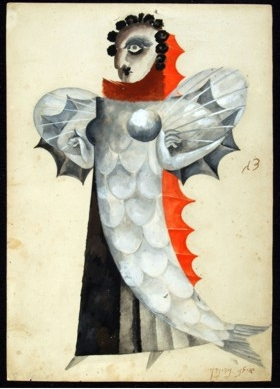 Игнатий Нивинский. Костюм рыбы для "Голема". Гуашь, музей Бахрушина